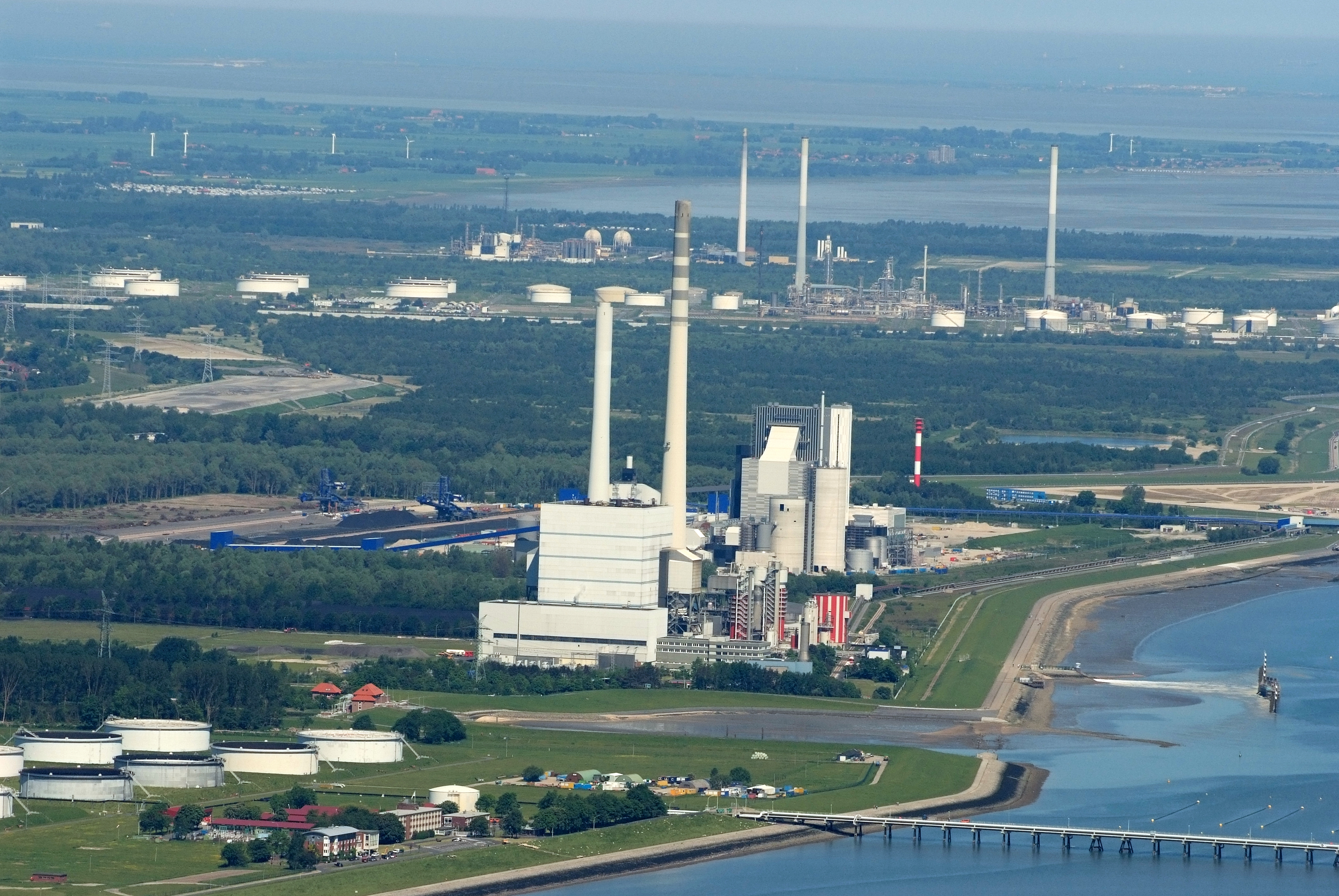 Fotoflug vom Flugplatz Nordholz-Spieka über Cuxhaven und Wilhelmshaven